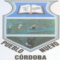 escudo de Pueblo Nuevo